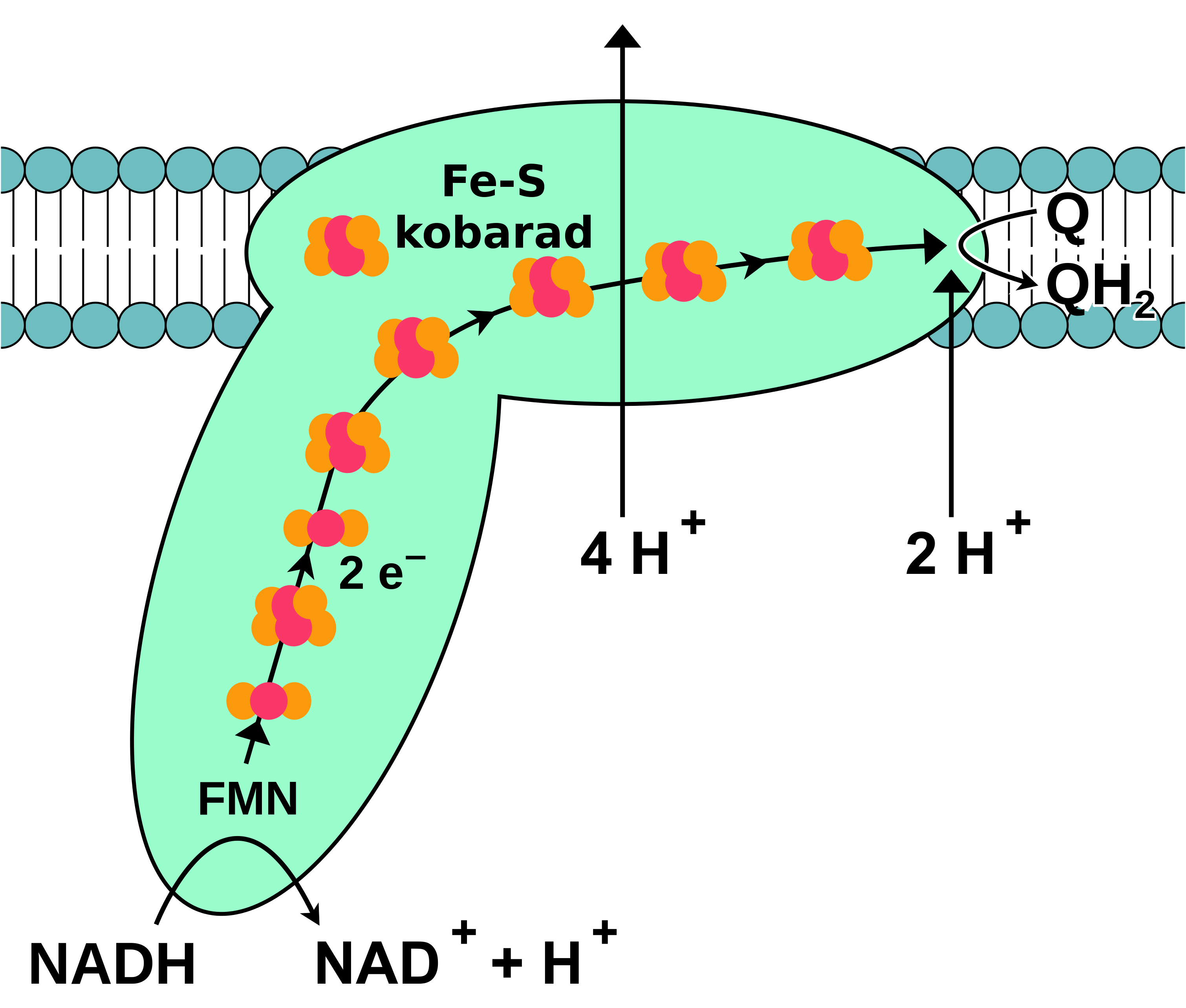 Mitokondriaalse elektronide transpordi ahela I kompleks.